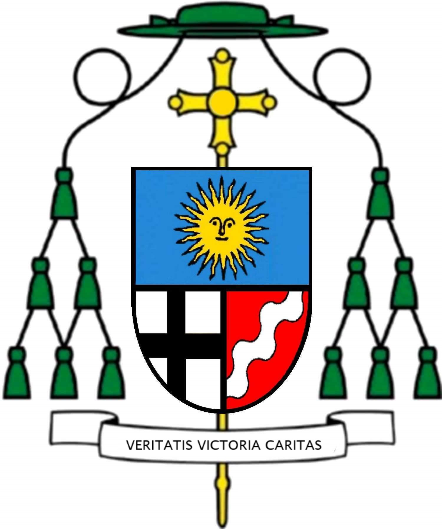 Wappen Eduard Schick (1906-2000), Weihbischof in Fulda 1962-1974